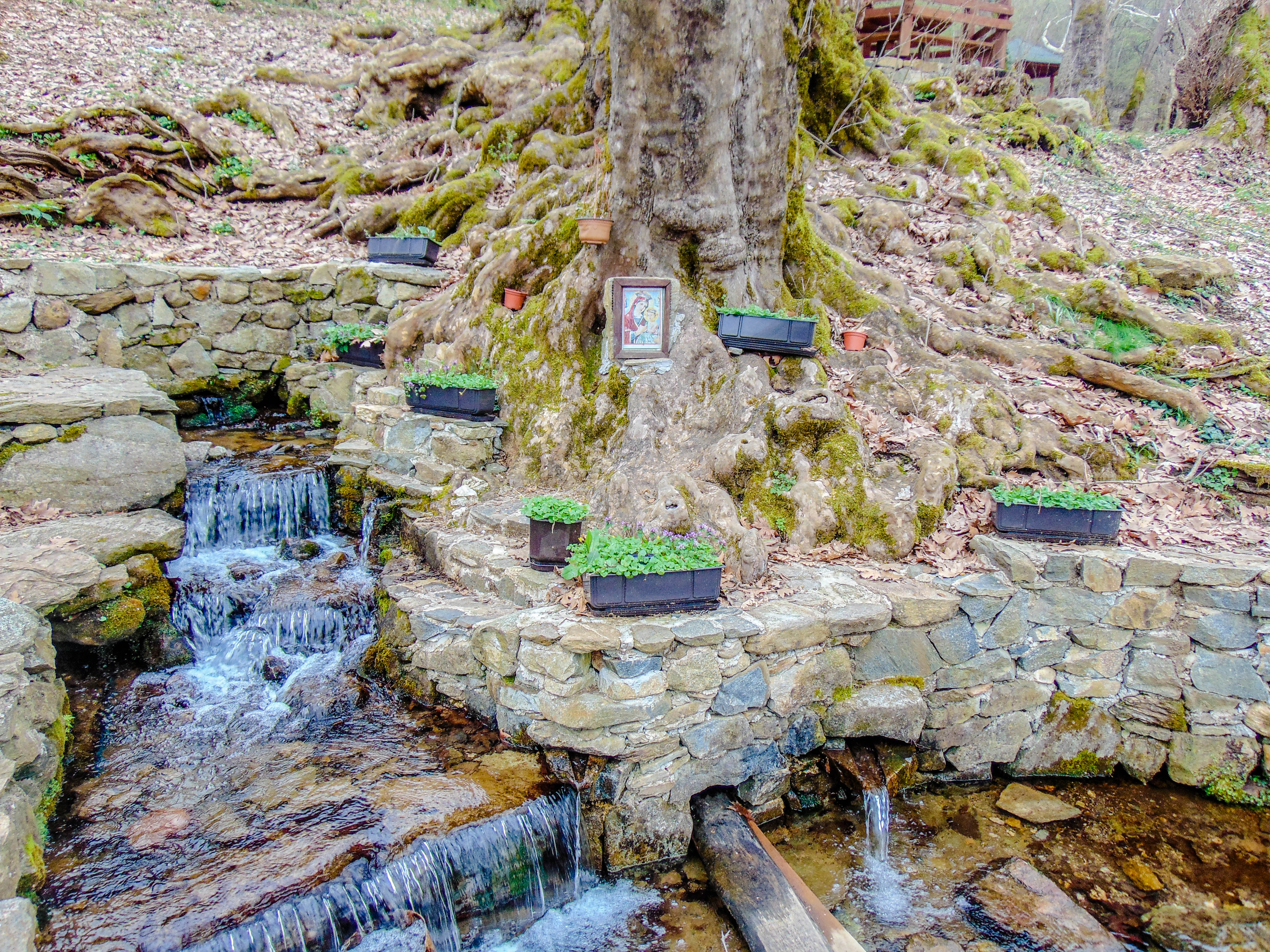 Мокрински извори